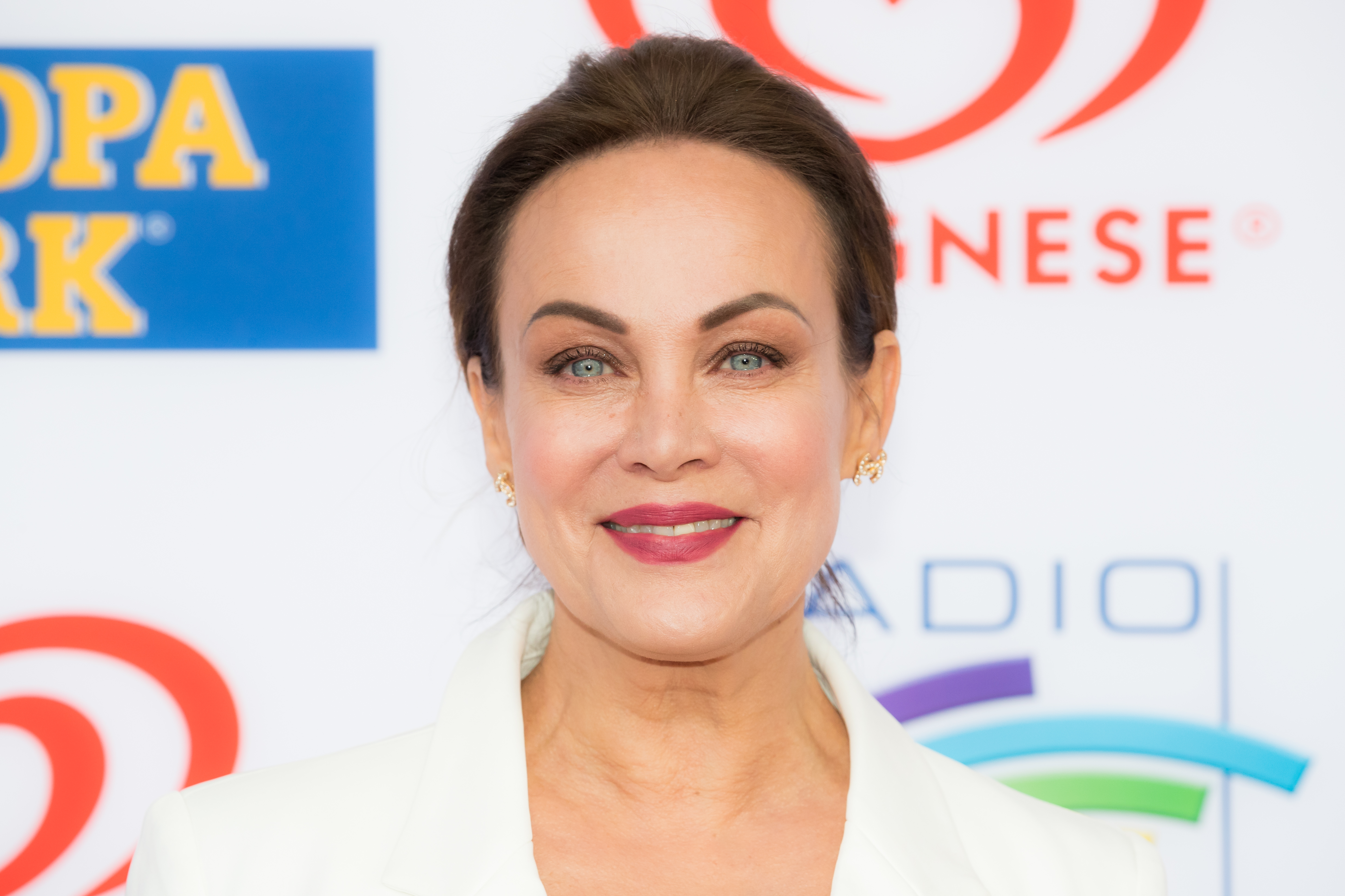 Sonja Kirchberger during Radio Regenbogen Award 2019 at Europapark, Rust, Baden-Württemberg, Germany on 2019-04-12, Photo: Sven Mandel